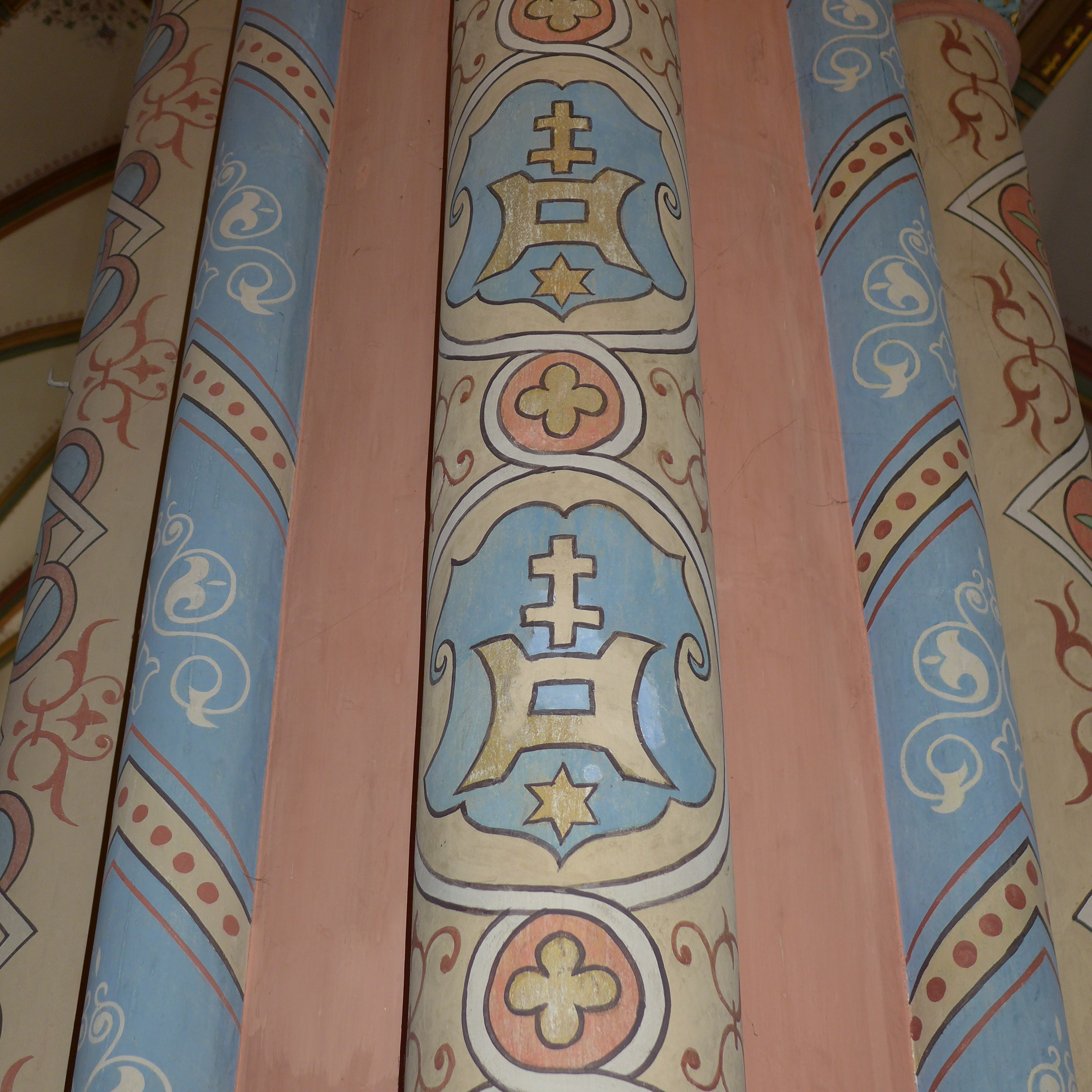 St. Katharina (Wallerfangen), Pfeilerornamente mit Wallerfanger Wappen